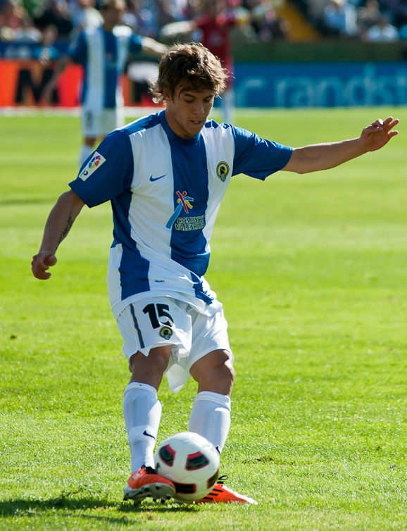 El jugador herculà Kiko Femenia